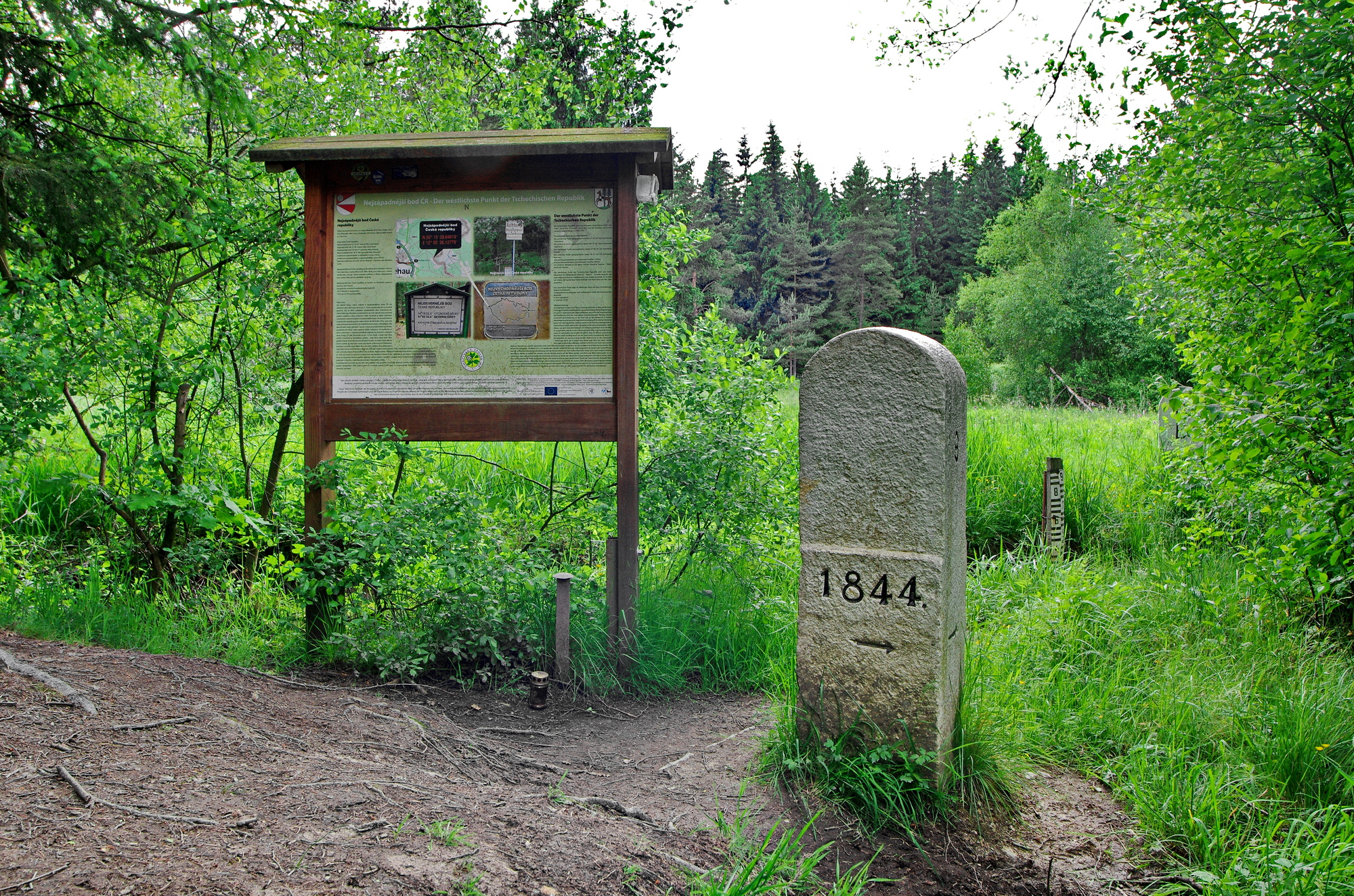 Nejzápadnější bod Česka, u zaniklé osady Újezd, Ašský výběžek, okres Cheb